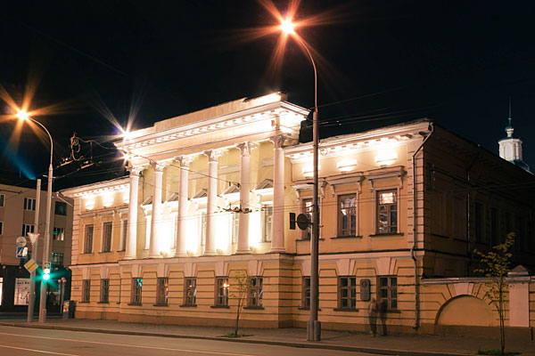 Главное здание Томского областного краеведческого музея, вид со стороны пр. Фрунзе